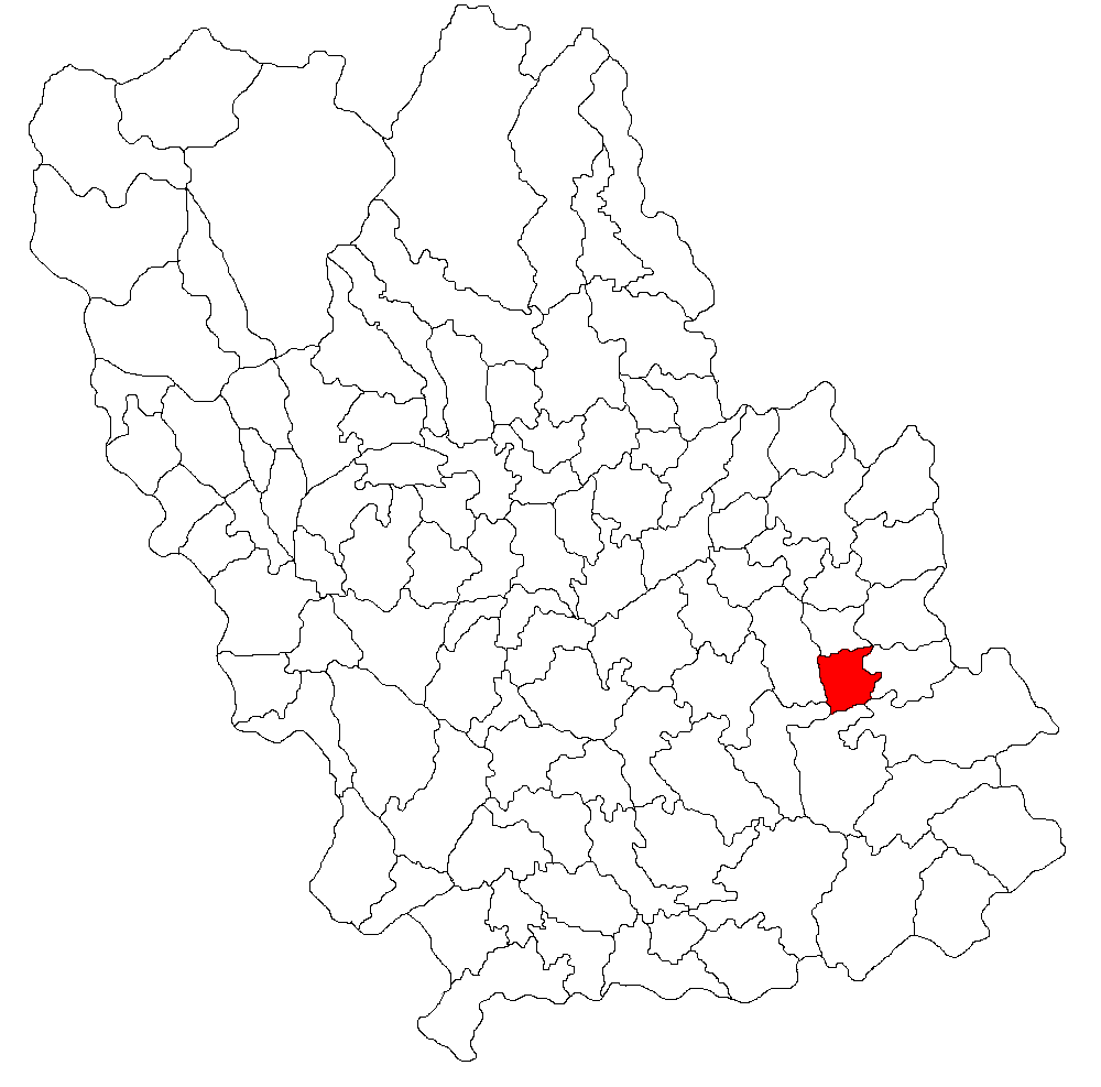 Categorie:Hărţi ale judeţului Prahova